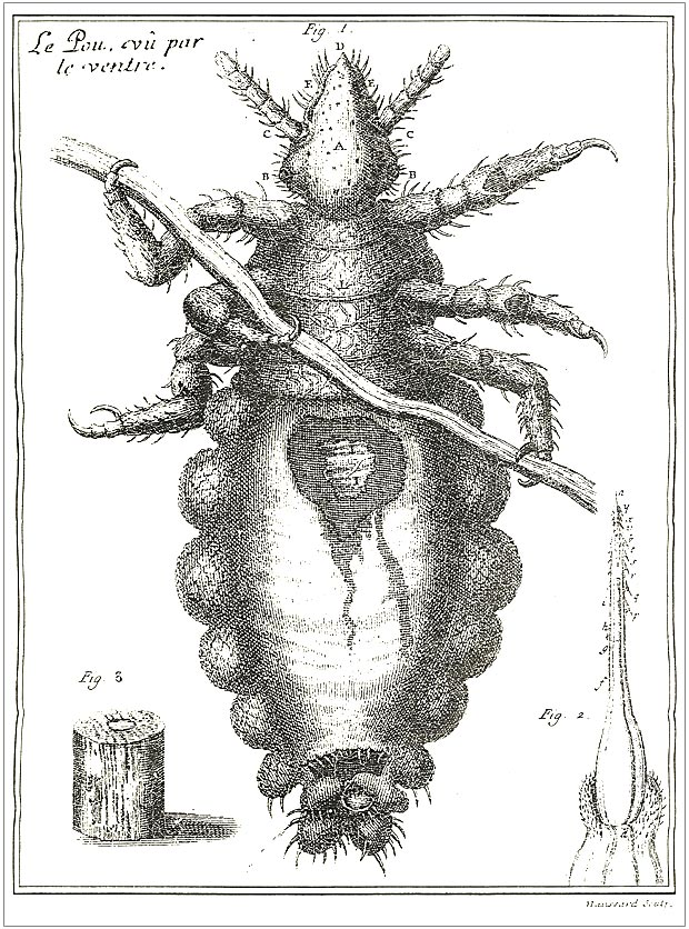 Гравюра XVIII века, изображающая блоху. Иллюстрация к книге Каржавин Ф.В. Описание вши, виденной в микроскоп, на французском и русском языках, сочиненном г. Федором Каржавиным, пенсионером Московского Университета с рисунками. Каруж, 1789.